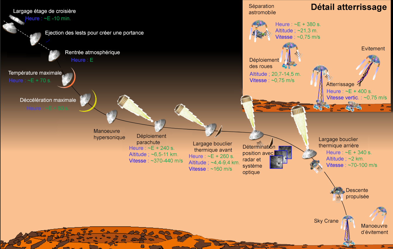 Phase de rentrée atmosphérique et de descente de la sonde spatiale martienne Mars 2020